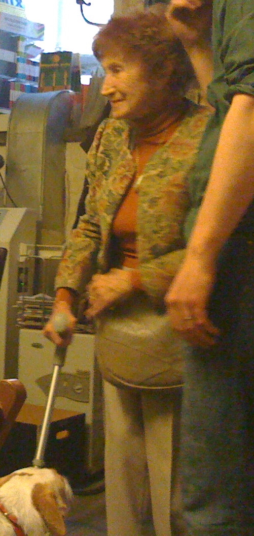 Bohumila Grögerová le 7 avril 2009.